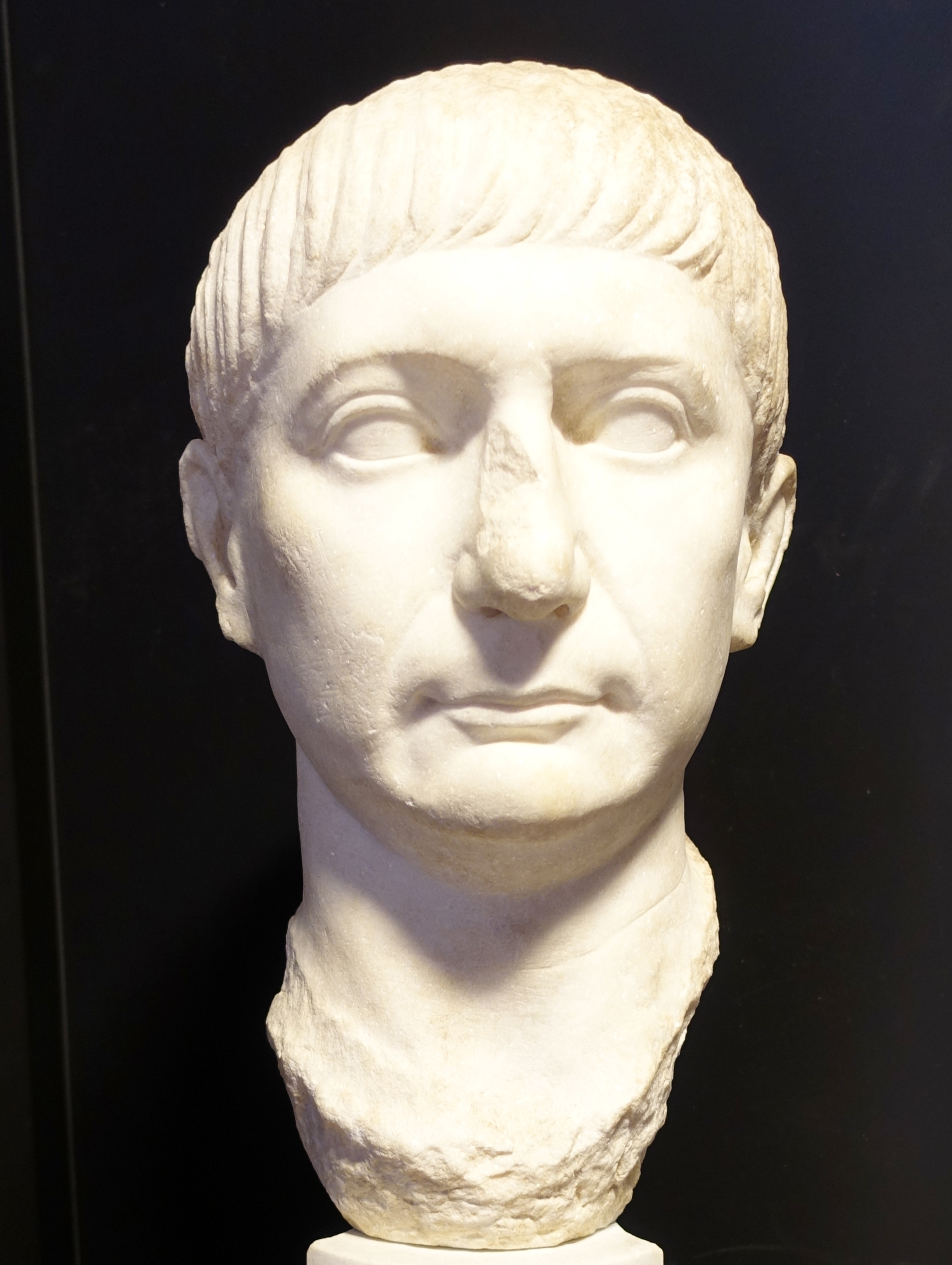 Büste des Kaisers Trajan (frühes 2. Jahrhundert n. Chr.), gefunden in Olbia, Archäologisches Nationalmuseum Cagliari, Sardinien, Italien